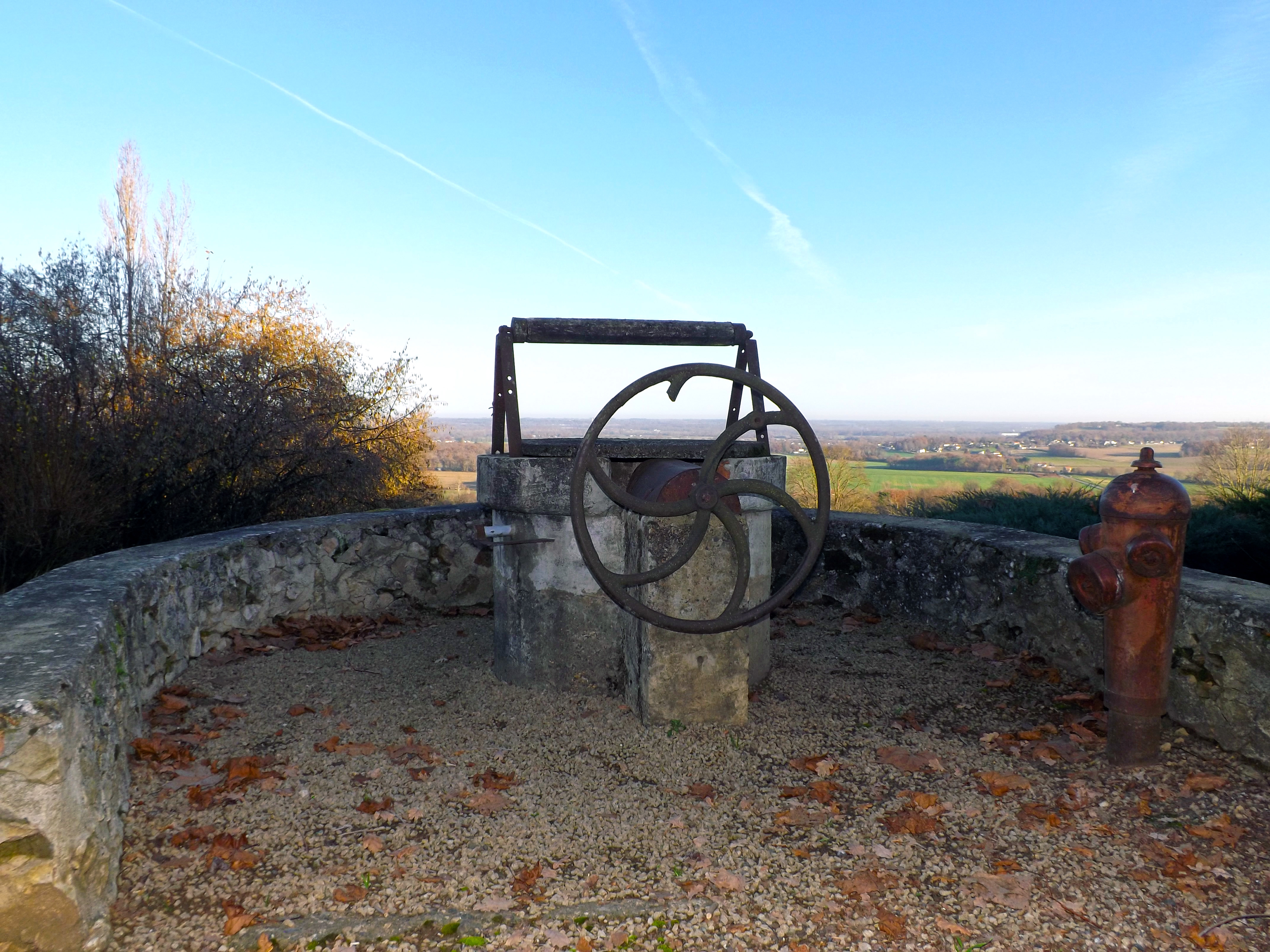 Puits communal de Banos, Landes, France